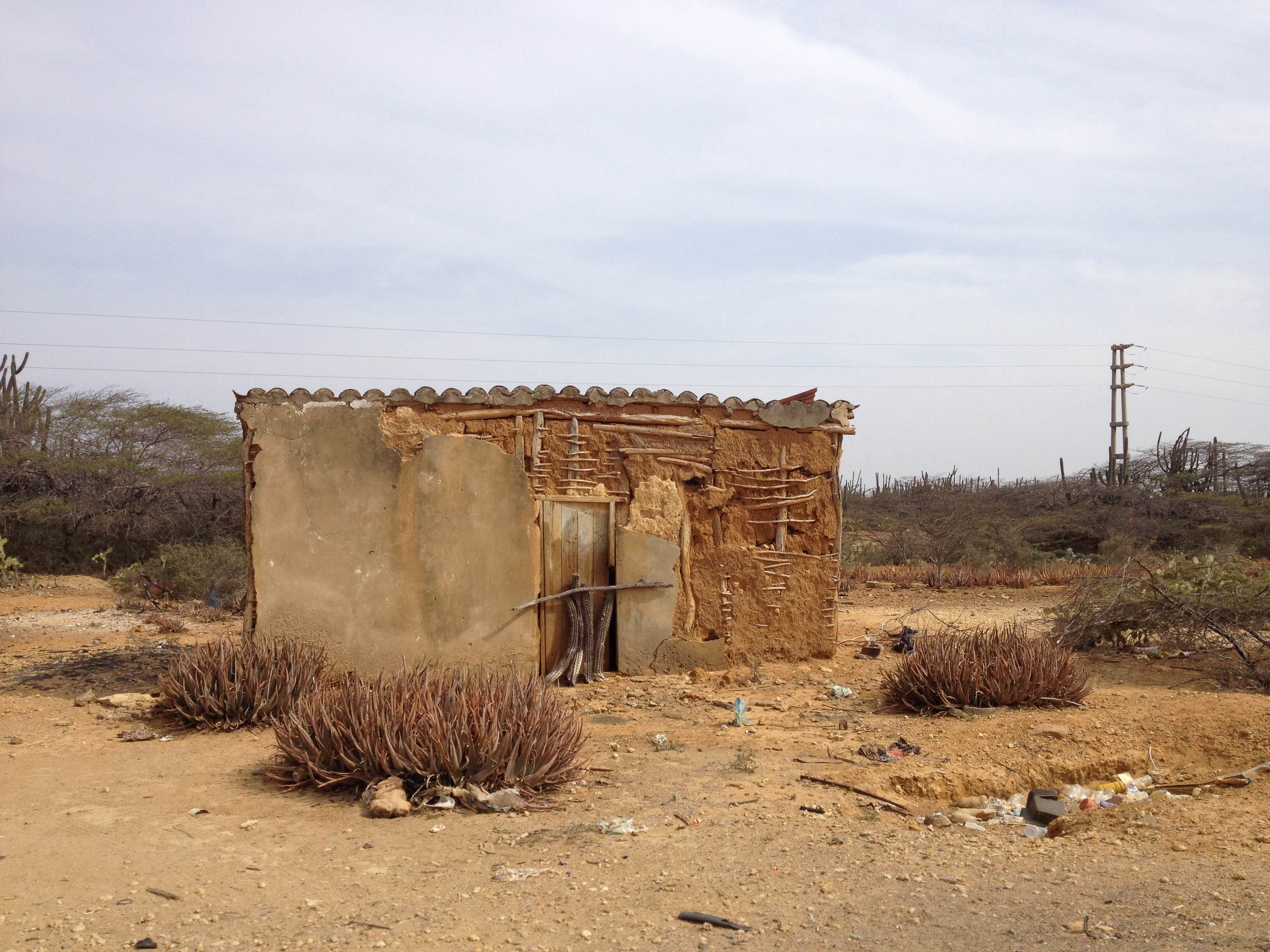 Casa de barro (bahareque) abandonada en la Vía Santa Ana de Paraguaná